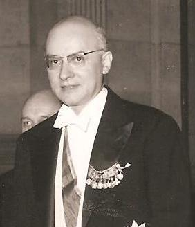 Jean Foyer reçu au Tribunal de commerce de Paris en 1964